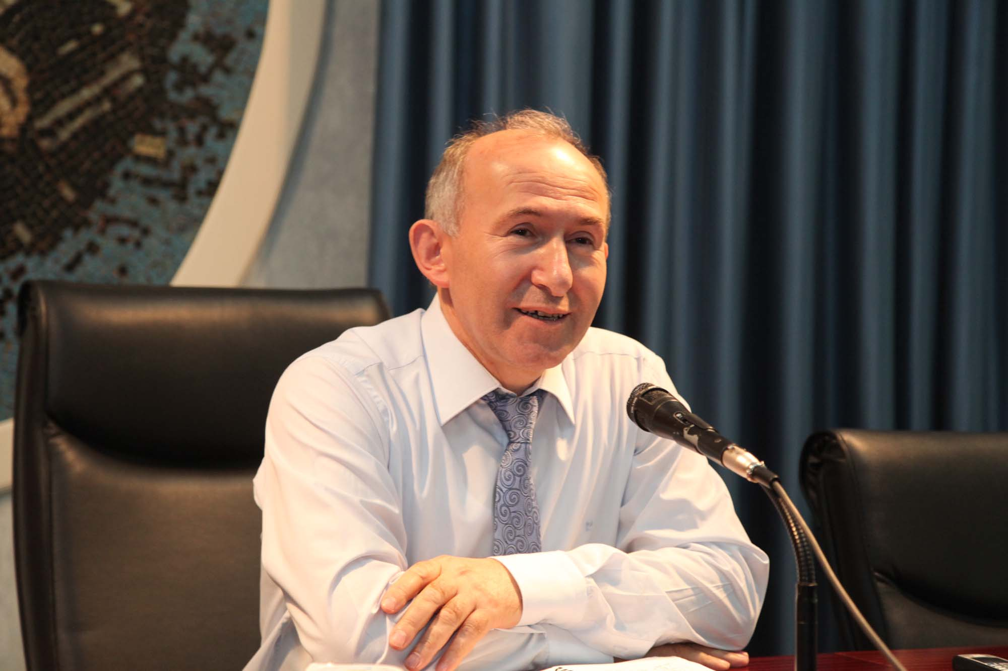 Ahmet Şimşirgil